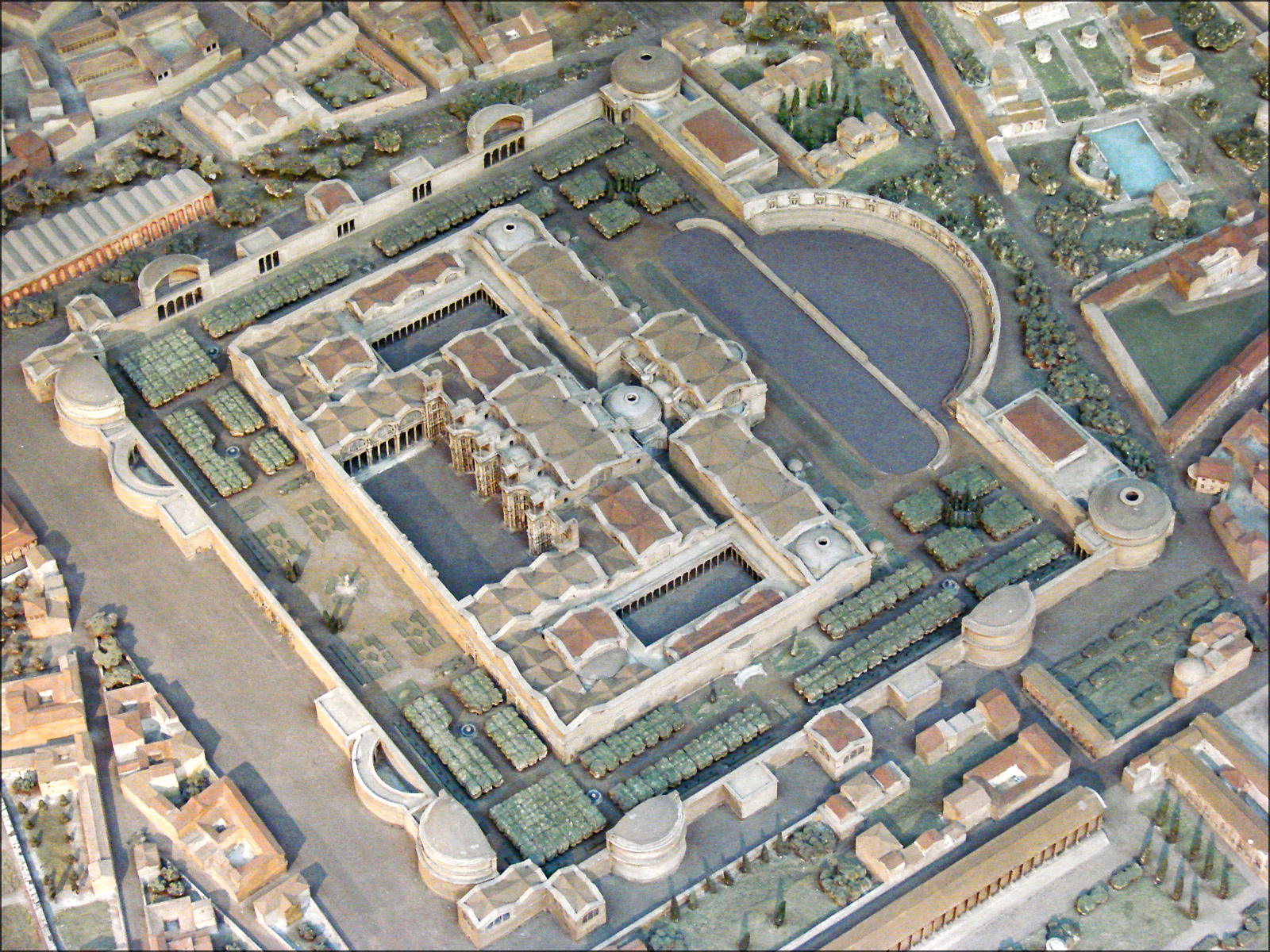 Les thermes de Dioclétien. Les thermes de Dioclétien datent de 298-306. C'étaient les plus grands de Rome avec 112.500 m2 de superficie. La place de la République actuelle suit les limites du mur d'enceinte. voir un des sites sur Rome de l'auteur